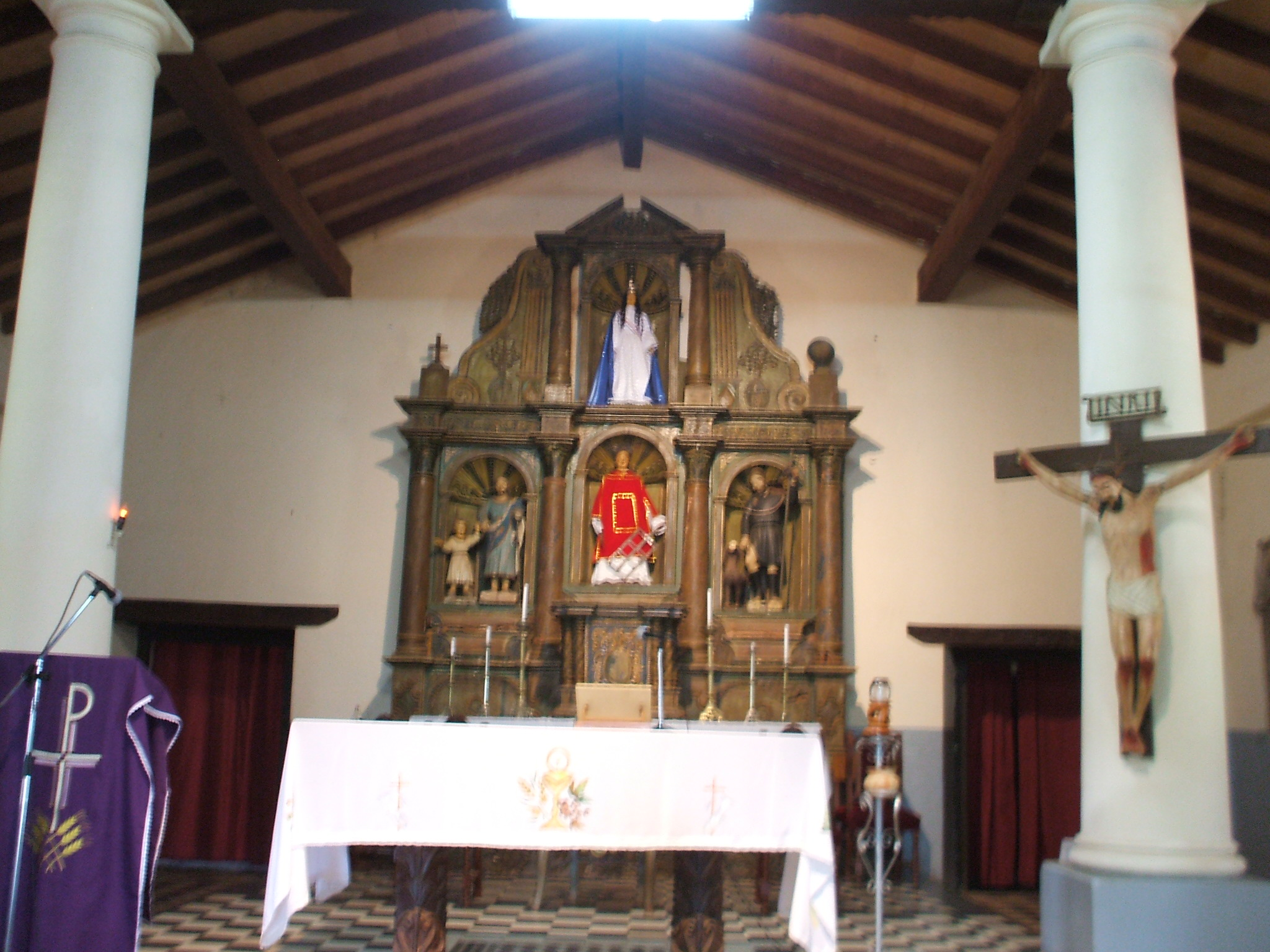 Atrio